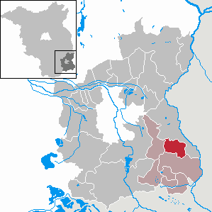 Groß Schacksdorf-Simmersdorf in Brandenburg (Country) - District Spree-Neiße